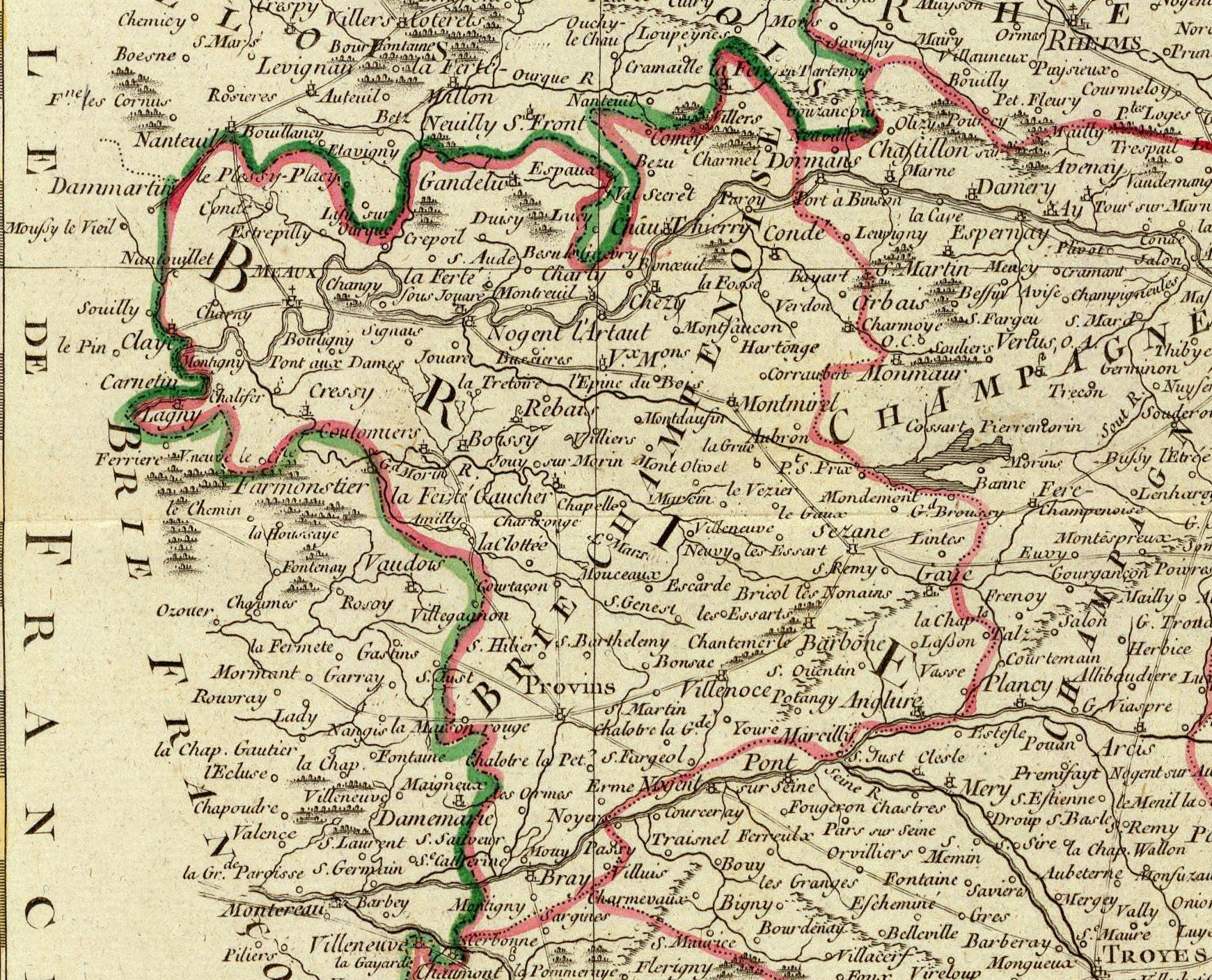 Extrait de la carte du gouvernement de Champagne et Brie. Projettée et assujettie aux observations.